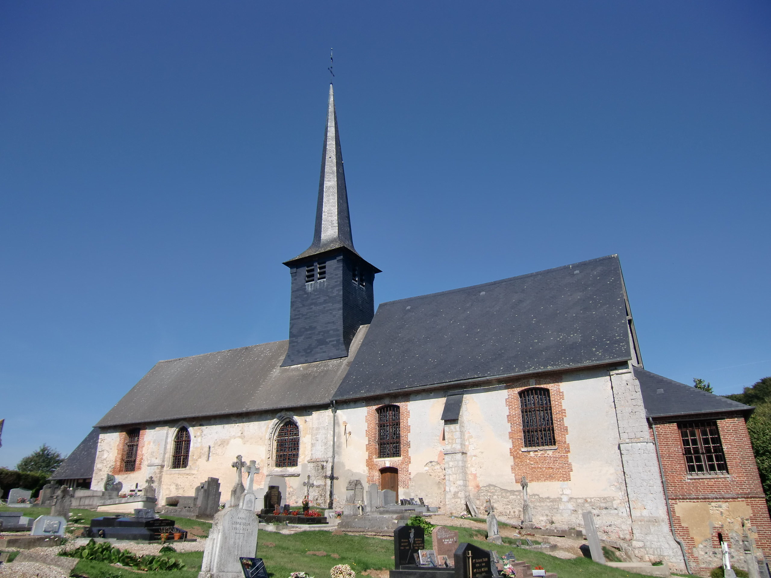 église de Triqueville (Eure, Normandie, France)